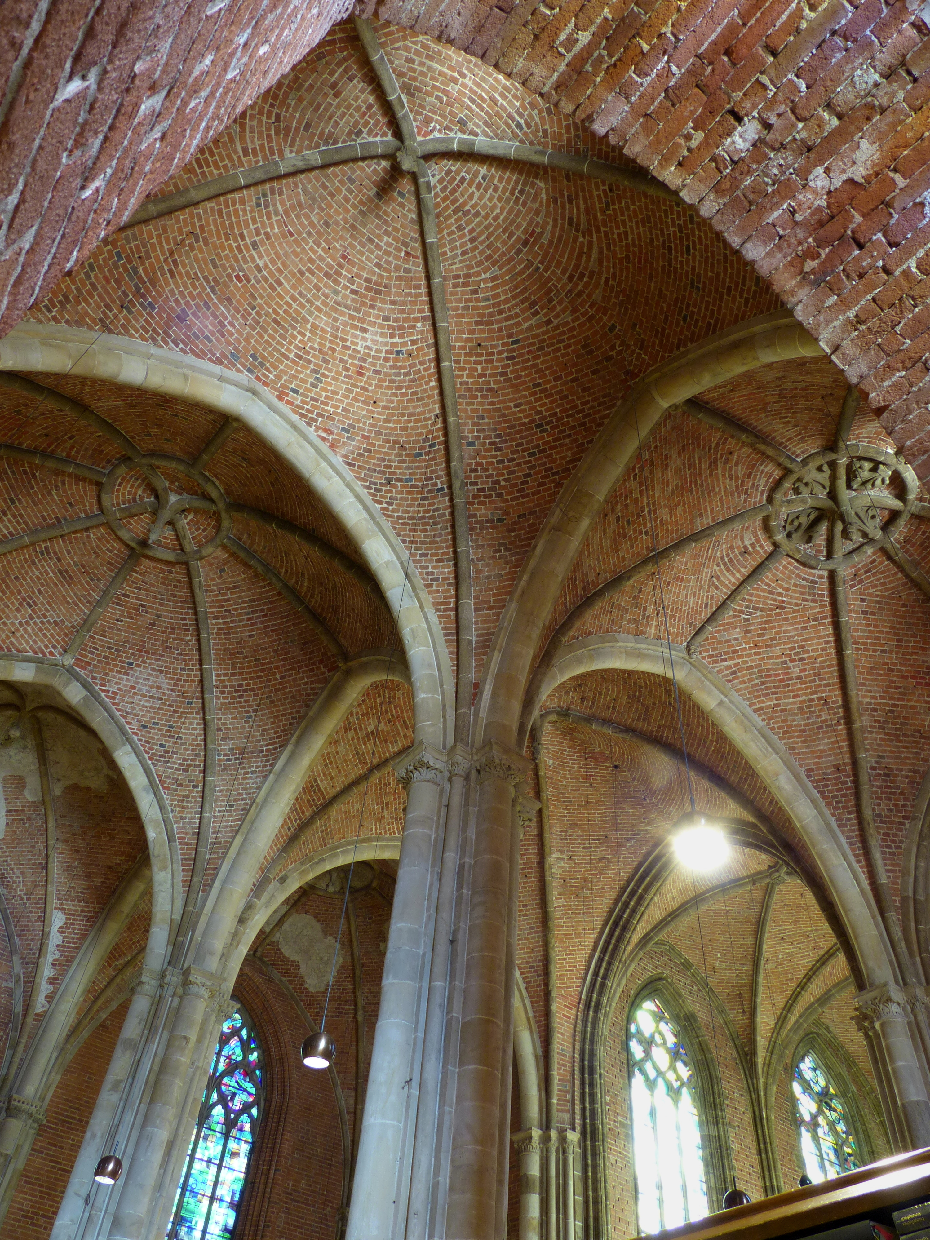 Liebfrauenkirche in Bremen, mittlere und östliche Querreihe von Jochen, fotografiert vom inneren Haupteingang